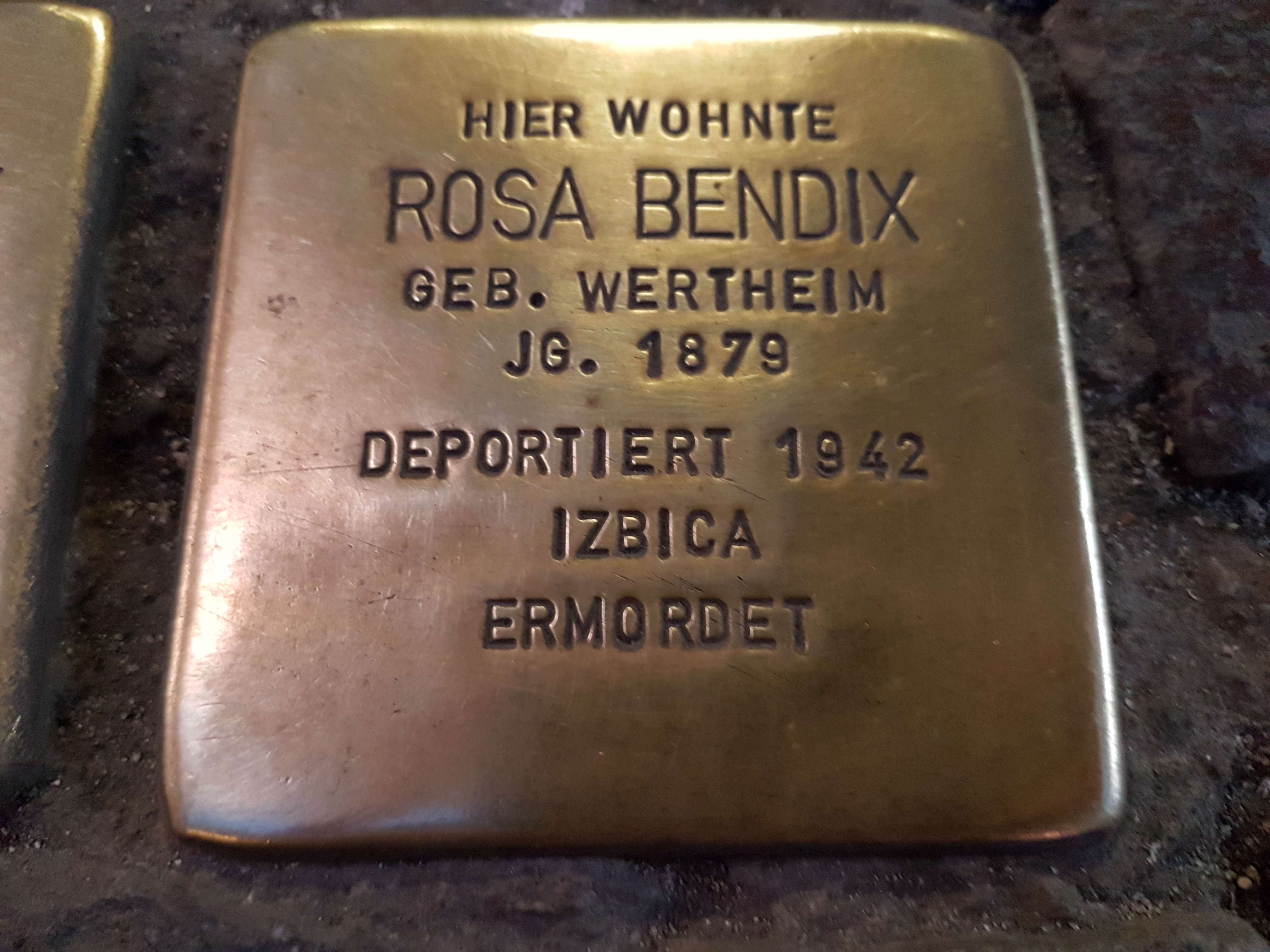 Stolperstein Duisburg Rosa Bendix